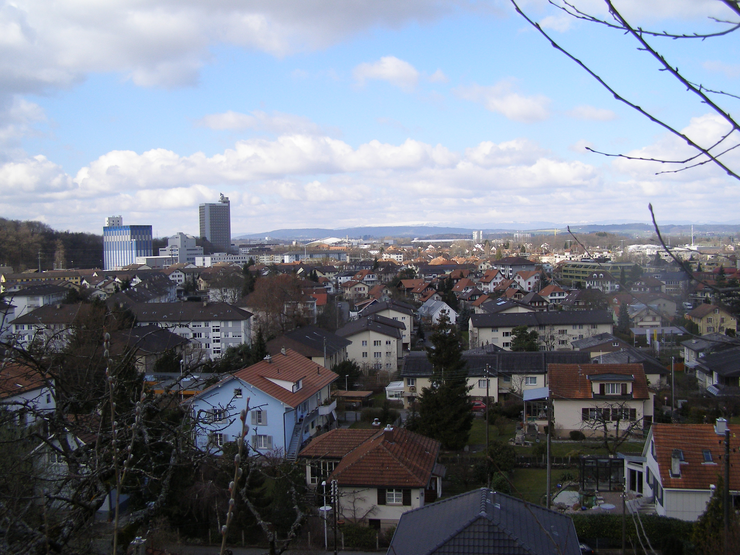 Sicht vom Ostermundigenberg auf Ostermundigen, Richtung Bern Wankdorf